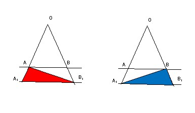 Доказ Талесове теореме за сличне троуглове